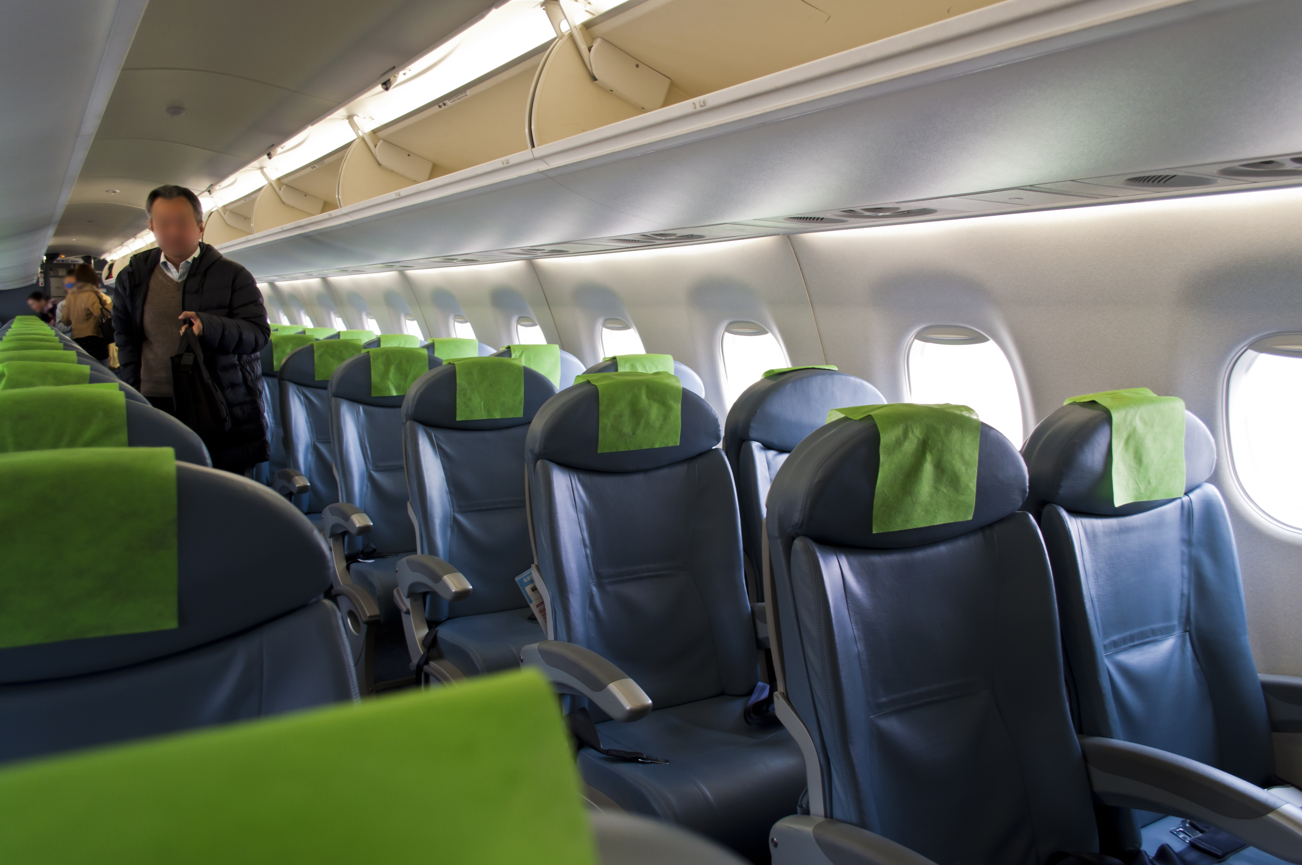 FDA（フジドリームエアラインズ）8号機 JA08FJの機内。投稿者が撮影した画像にプライバシー保護加工済